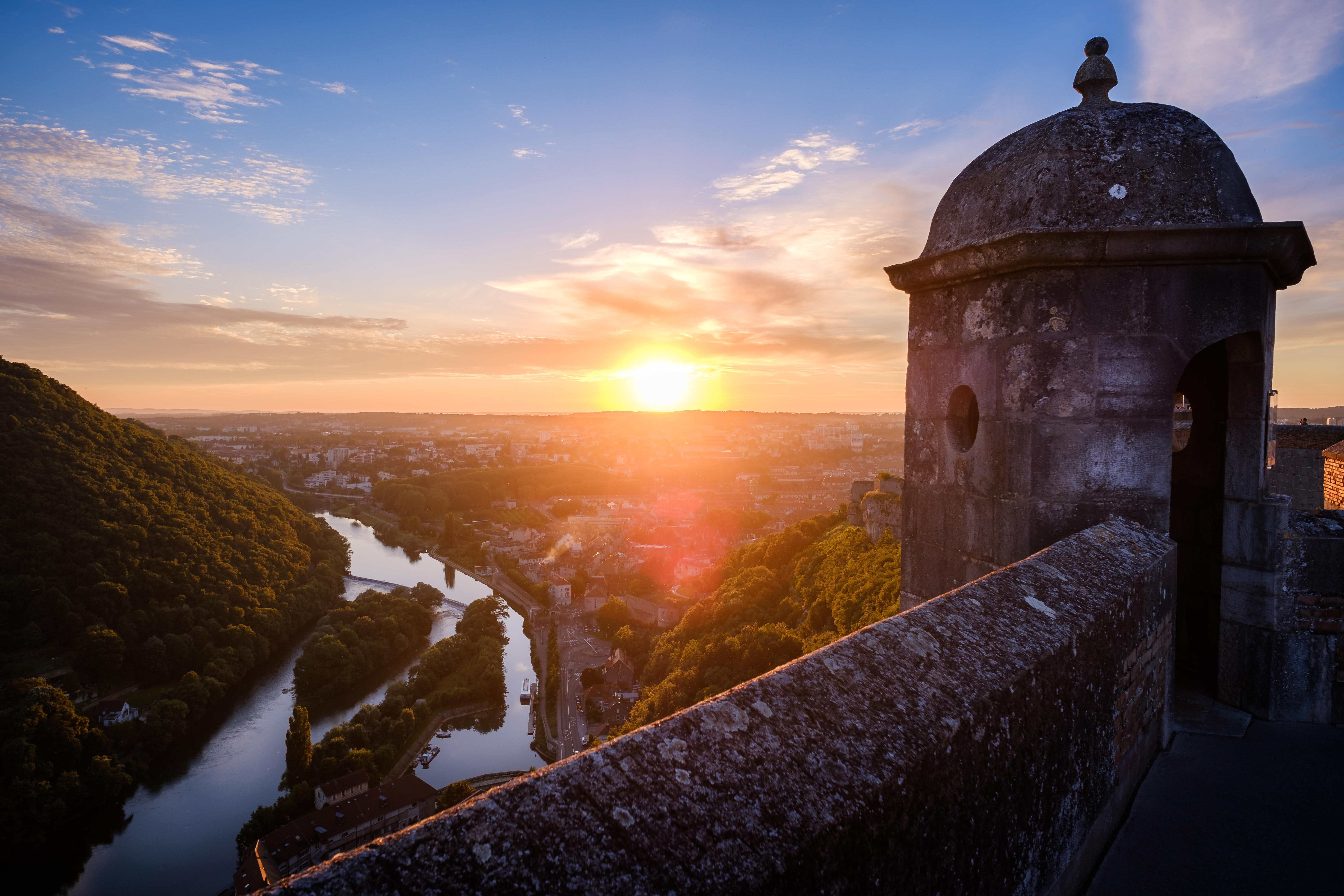 Vue sur La Boucle depuis la Citadelle de Besançon